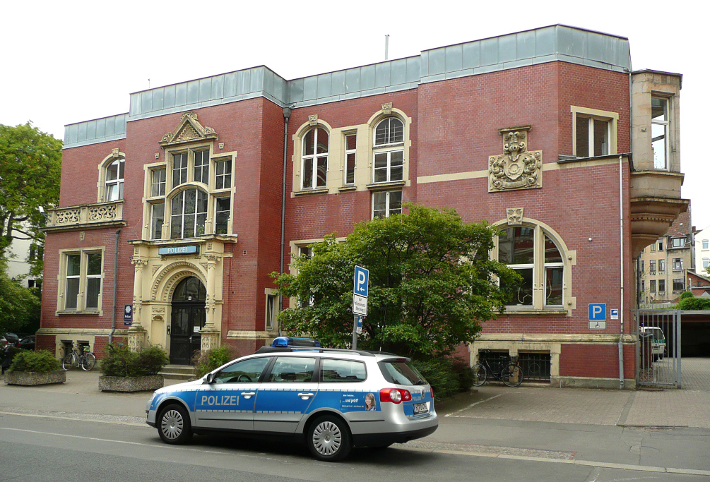 Ehemalige PI West der Polizeidirektion Hannover (bis 2011)